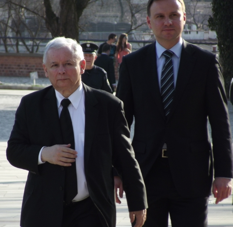 Zdjęcie zrobione podczas trzeciej rocznicy pogrzebu Lecha i Marii Kaczyńskich w Krakowie.